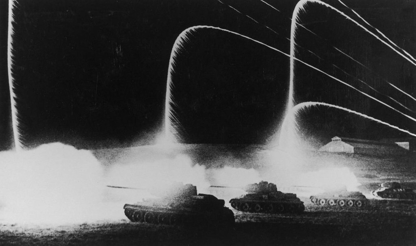 Ночная атака советских танков Т-34-85 у станции Раздельная в районе Одессы. Для освещения используются сигнальные ракеты. На заднем плане — здание станции Раздельная